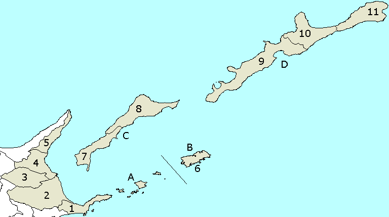 北海道根室支庁